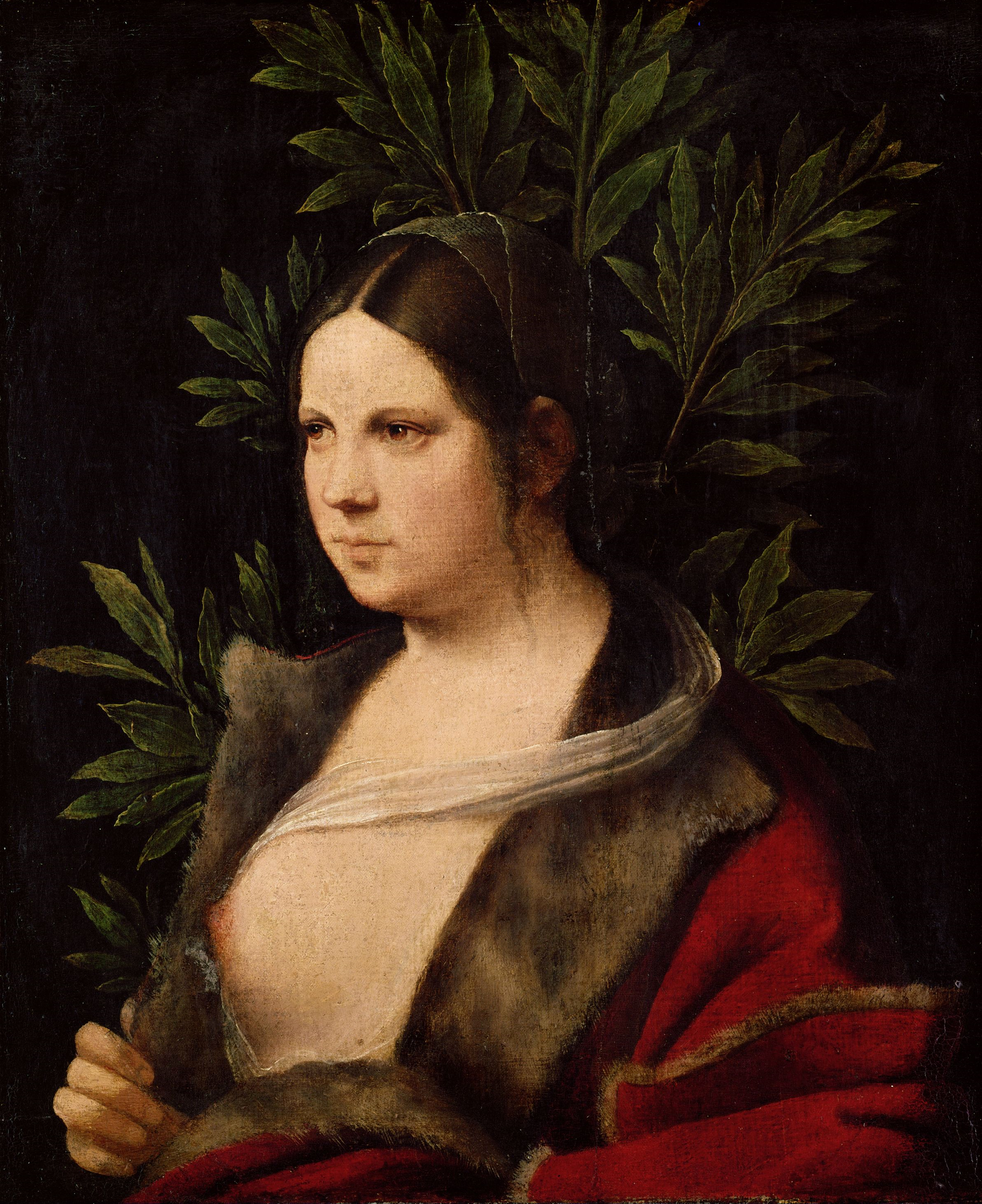 Laura di Audiberto di Noves